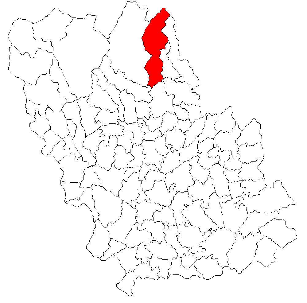 Categorie:Hărţi ale judeţului Prahova